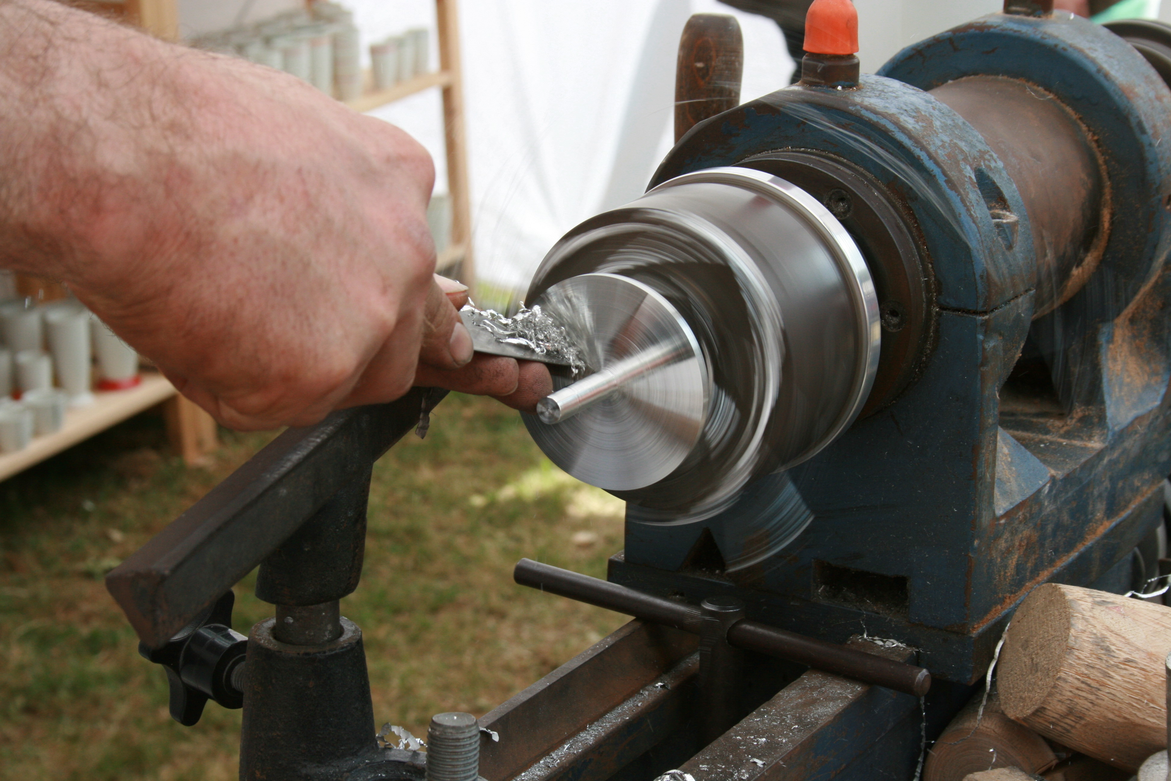 Flachsmarkt bei Burg Linn in Krefeld-Linn